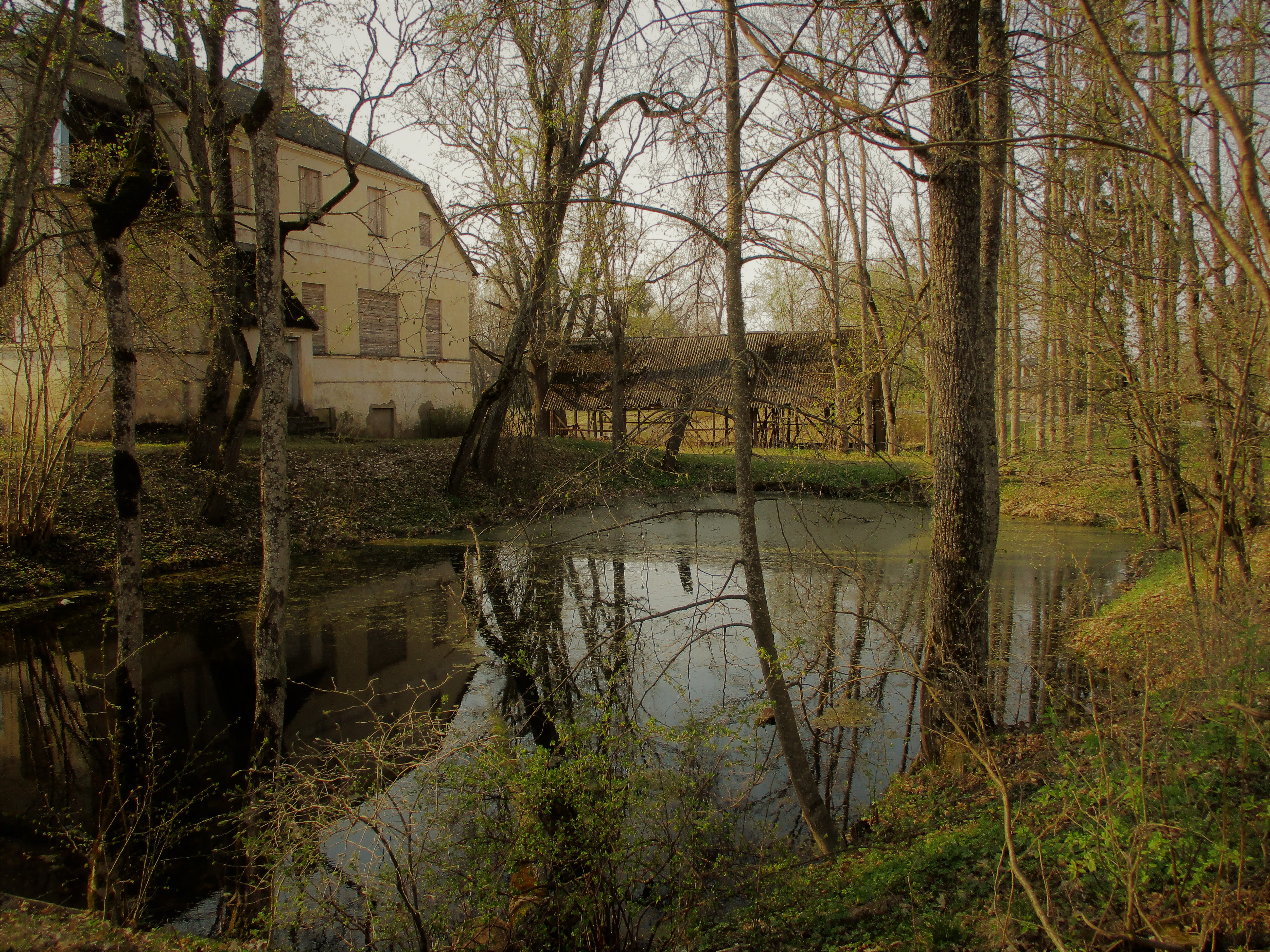 Vaade kagust idapoolse vallikraavi põhjaotsale